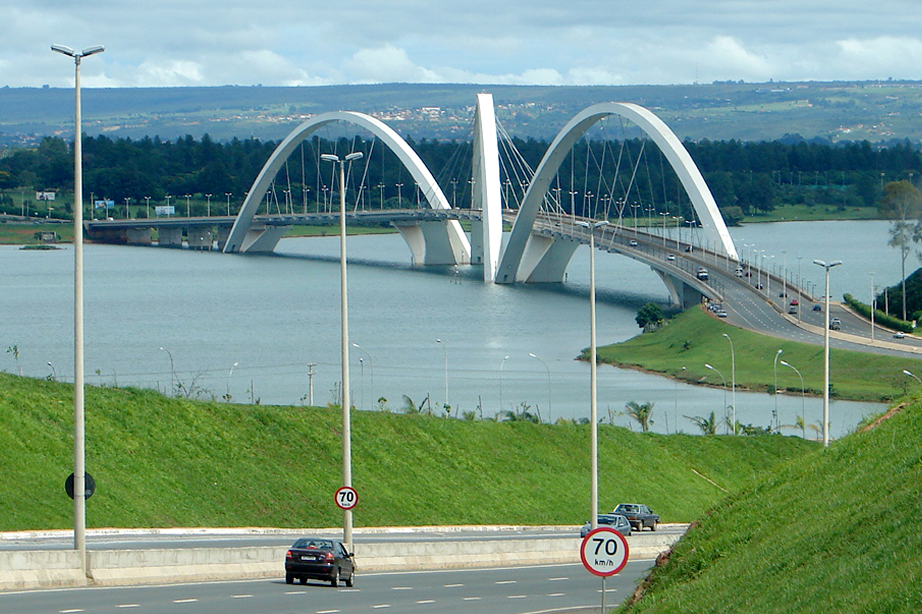 Traffic congestion, Brasilia DF (Plano Piloto), Brazil